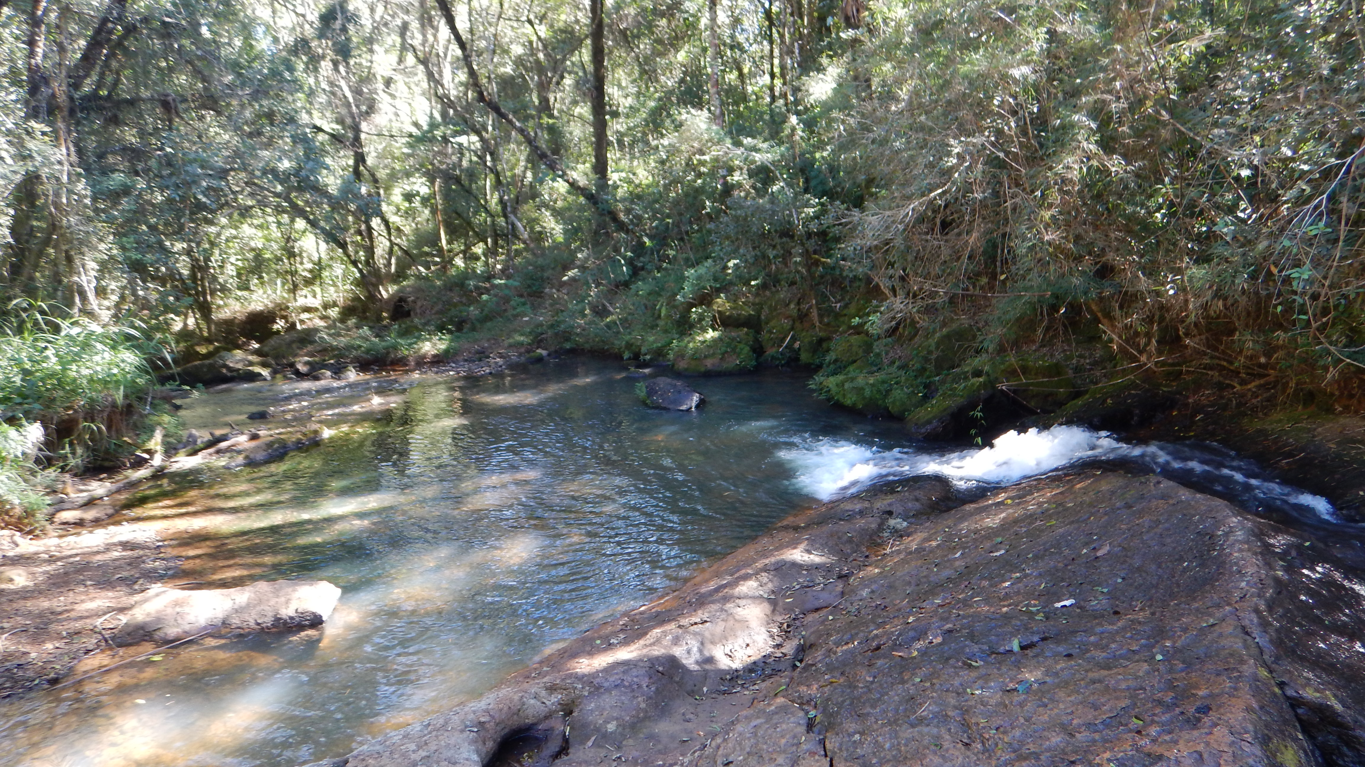 na Cachoeira do Ponte de Pedra 2016-07-03